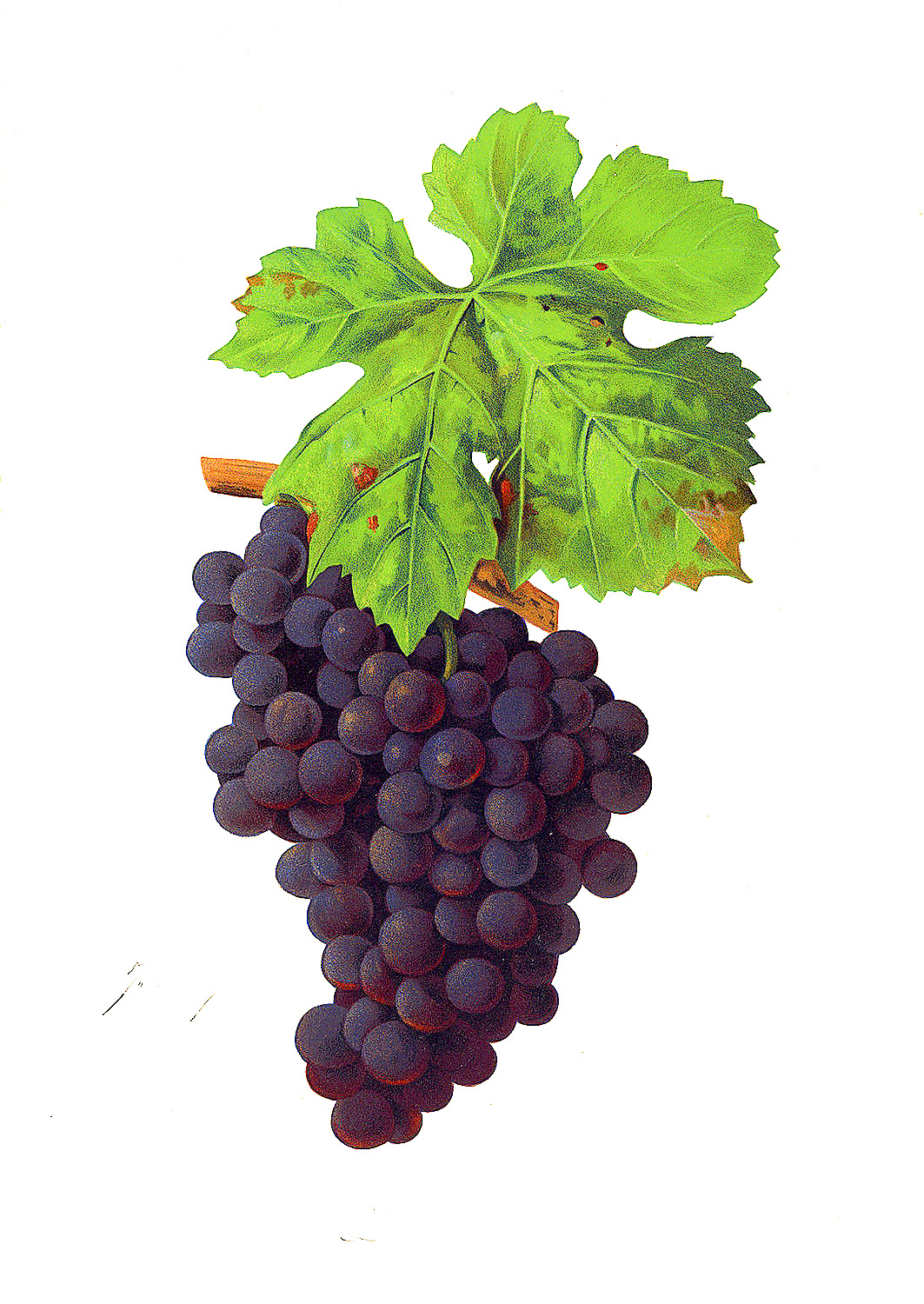 Grappe de dureza par Viala et Vermorel